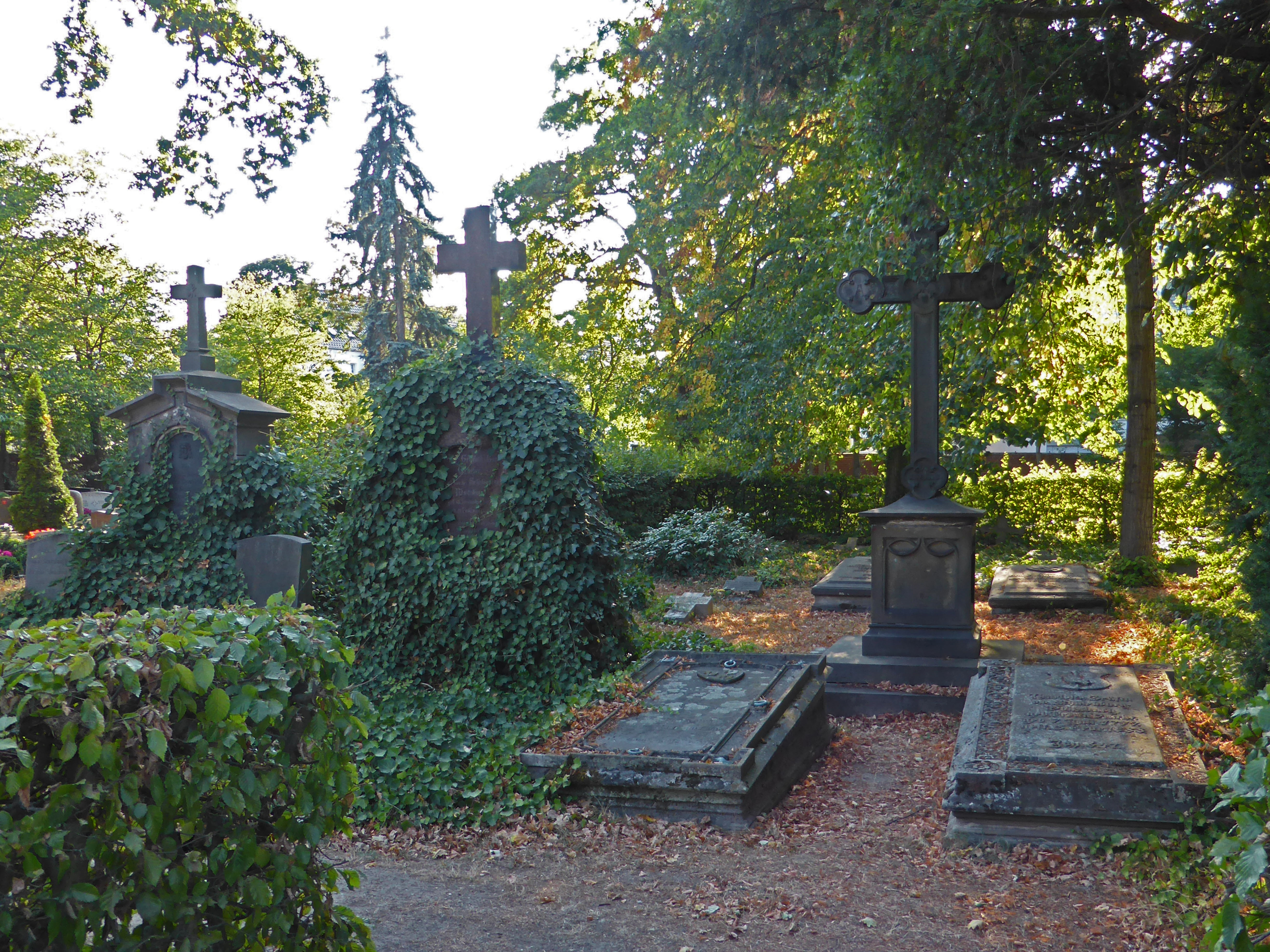 Familiengrabstätte der Familie von Schulenburg-Wolfsburg auf dem Rothenfelder Friedhof in Wolfsburg.